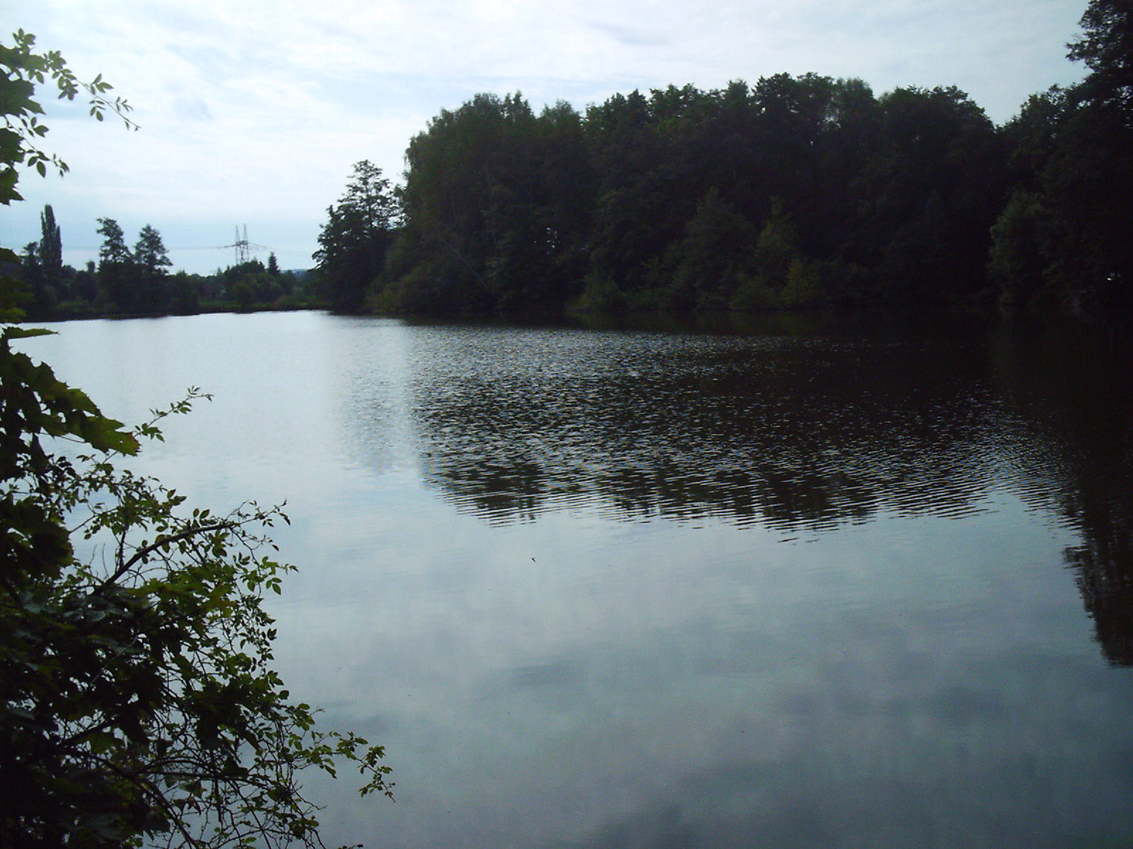 Starý rybník je přírodní památka ev. č. 410.